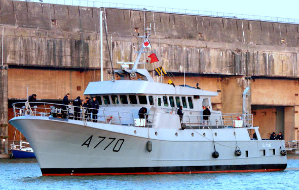 Bâtiment d'Instruction de Navigation français GLYCINE. Ecole navale de Brest